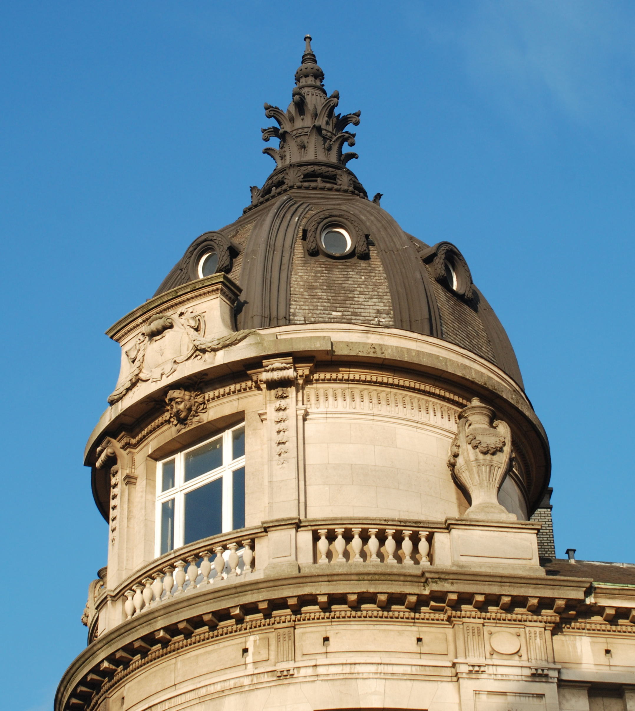 Belgique - Bruxelles - Caisse Générale d'Épargne et de Retraite